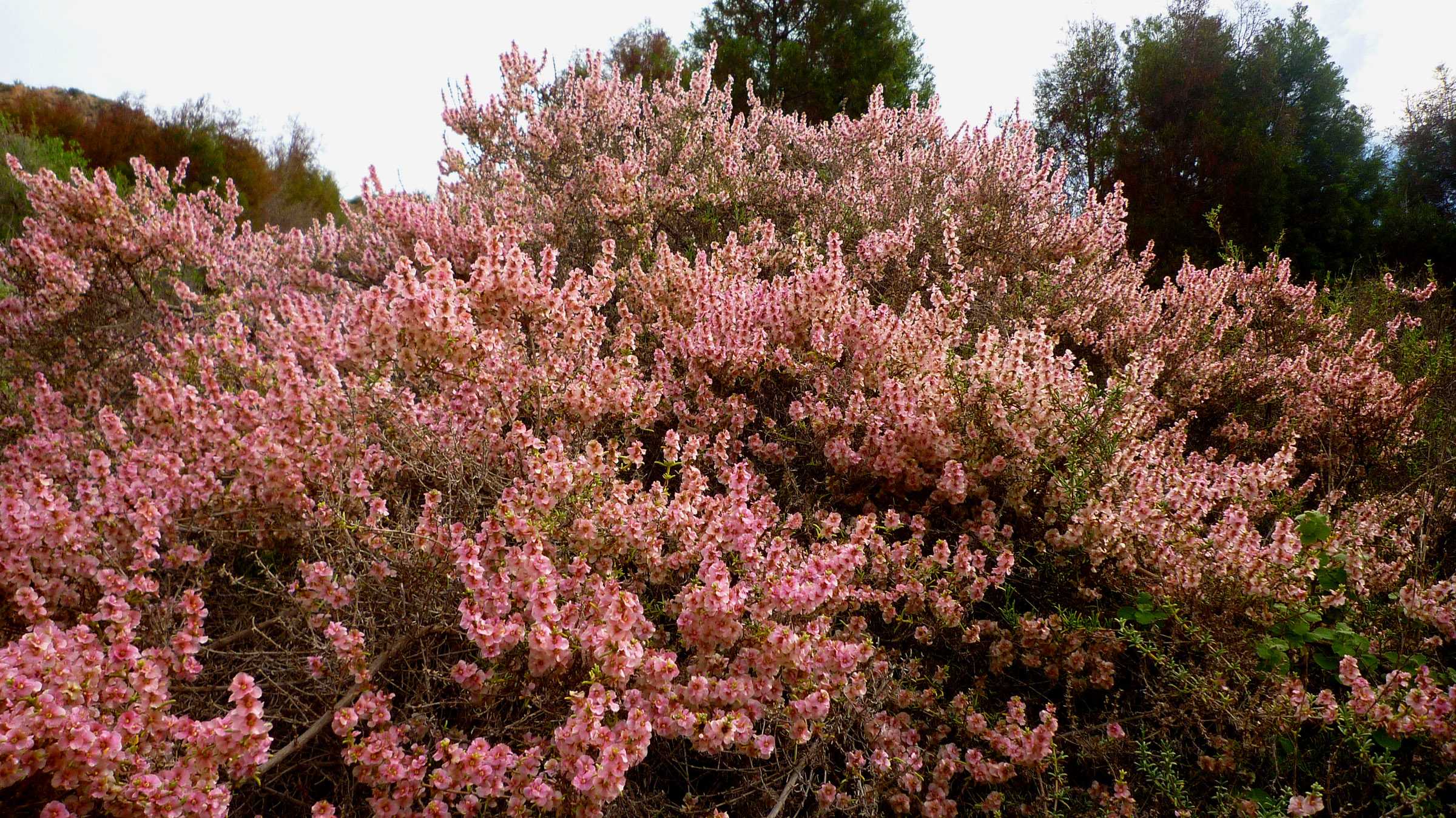 Salsola oppositifolia en flor en noviembre en el Monte San Julián (Cartagena, España)